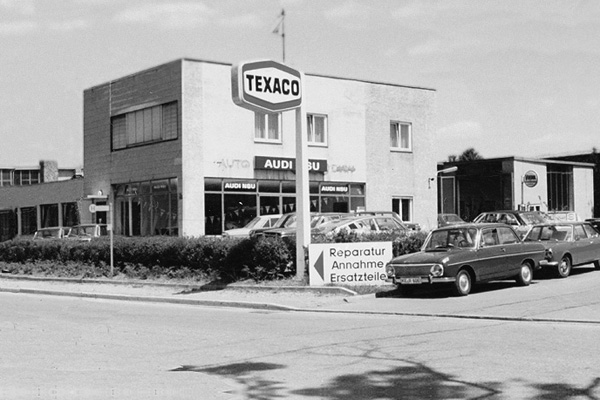 Firmengebäude der "Auto-Abt OHG" in der Oberwanger Straße 16 (Kempten)[1] in den 1970er-Jahren